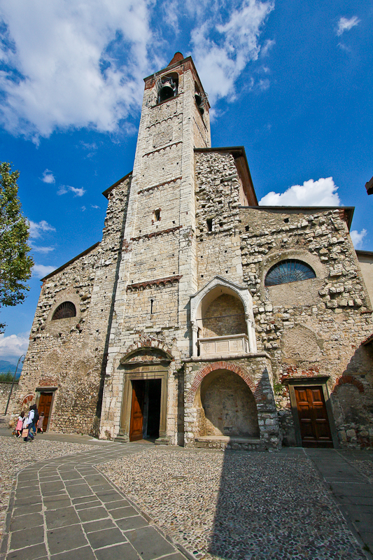 (Francesco Cataldo, Pieve di Sant'Andrea - Iseo (BS), Creative Commons share alike 3.0), asked for